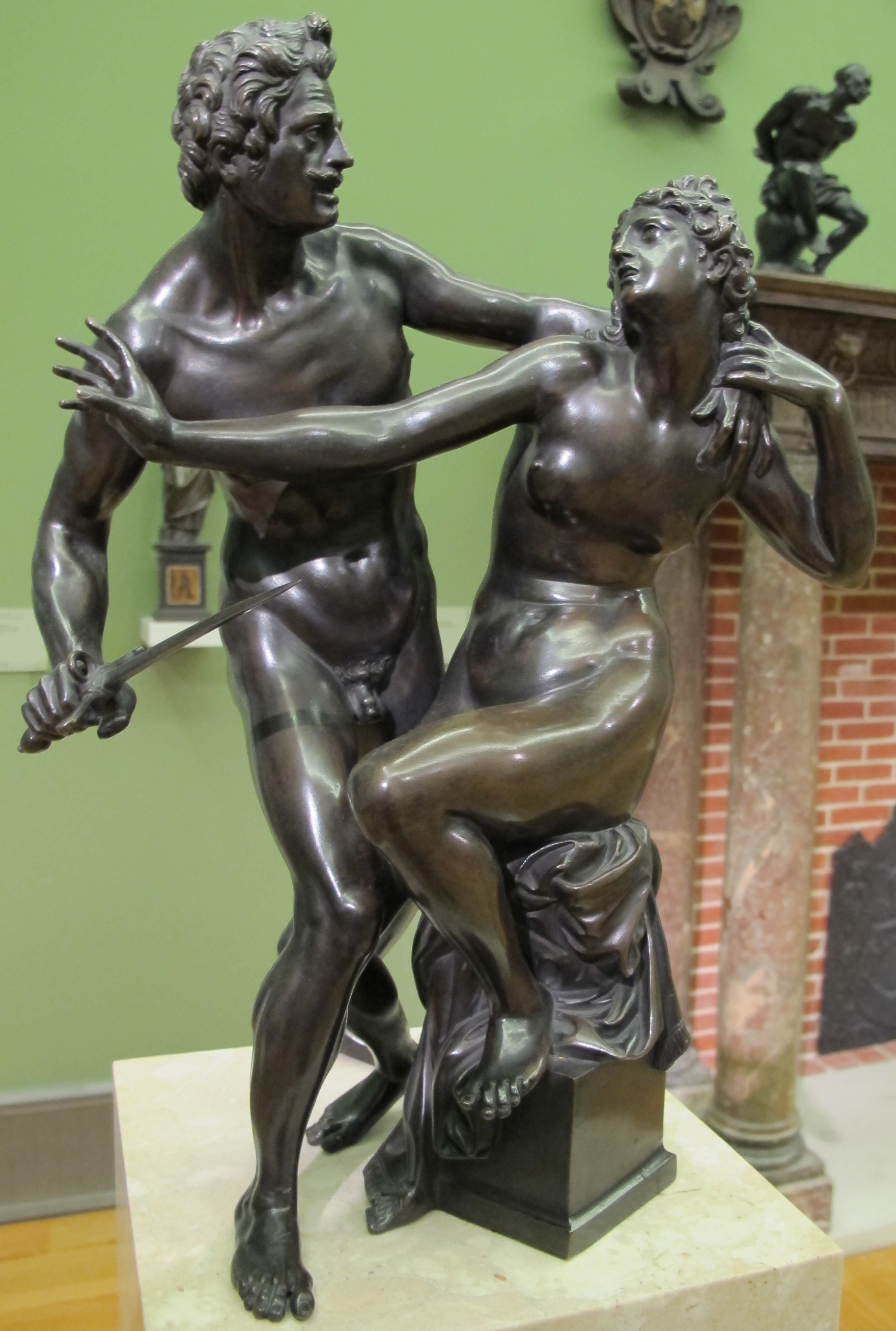 Pietro tacca, tarquinio e lucrezia